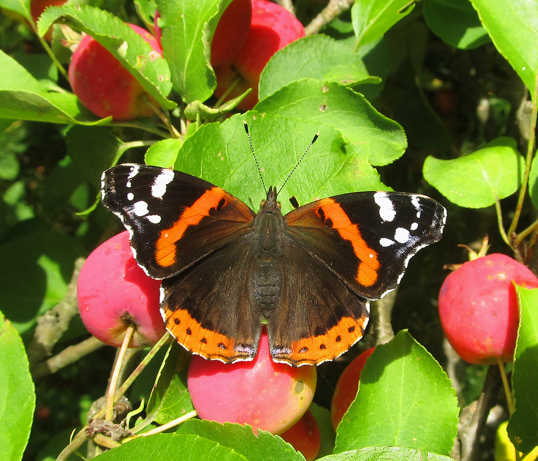 Адмирал(Vanessa atalanta) на яблоне